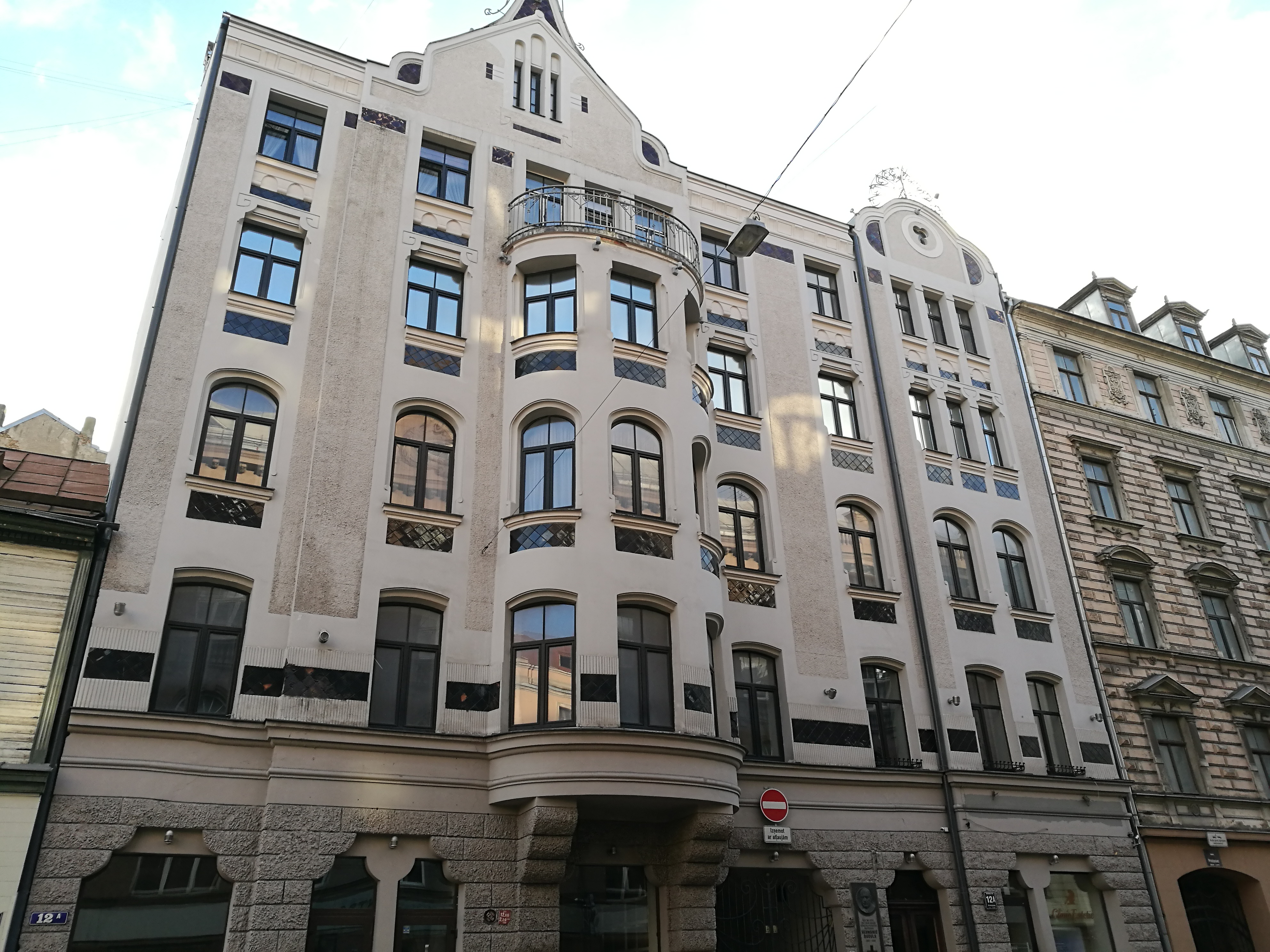 Dzīvojamā ēka, Rīga, Blaumaņa iela 12a